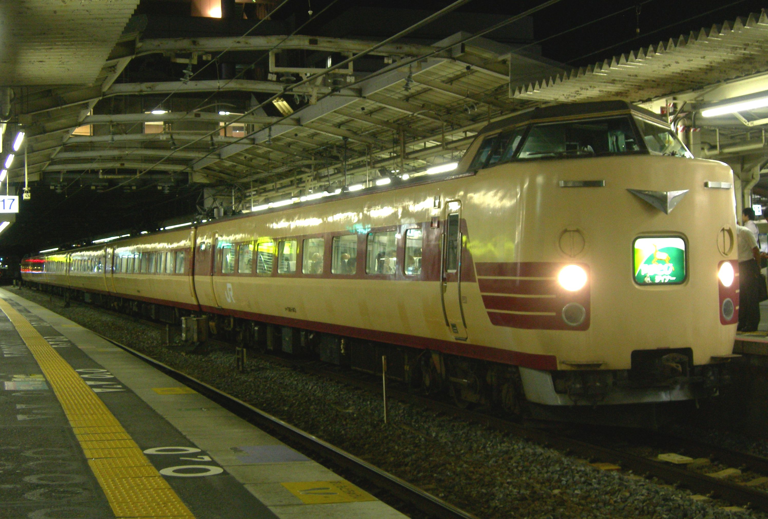 JR西日本381系電車